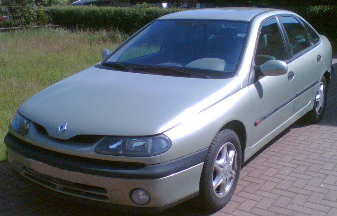 Bildbeschreibung: Renault Laguna, Phase 2, Baujahr 2000, deutsche KBA-Zulassung Fotograf: Gunnar Richter Datum: 10.06.2006